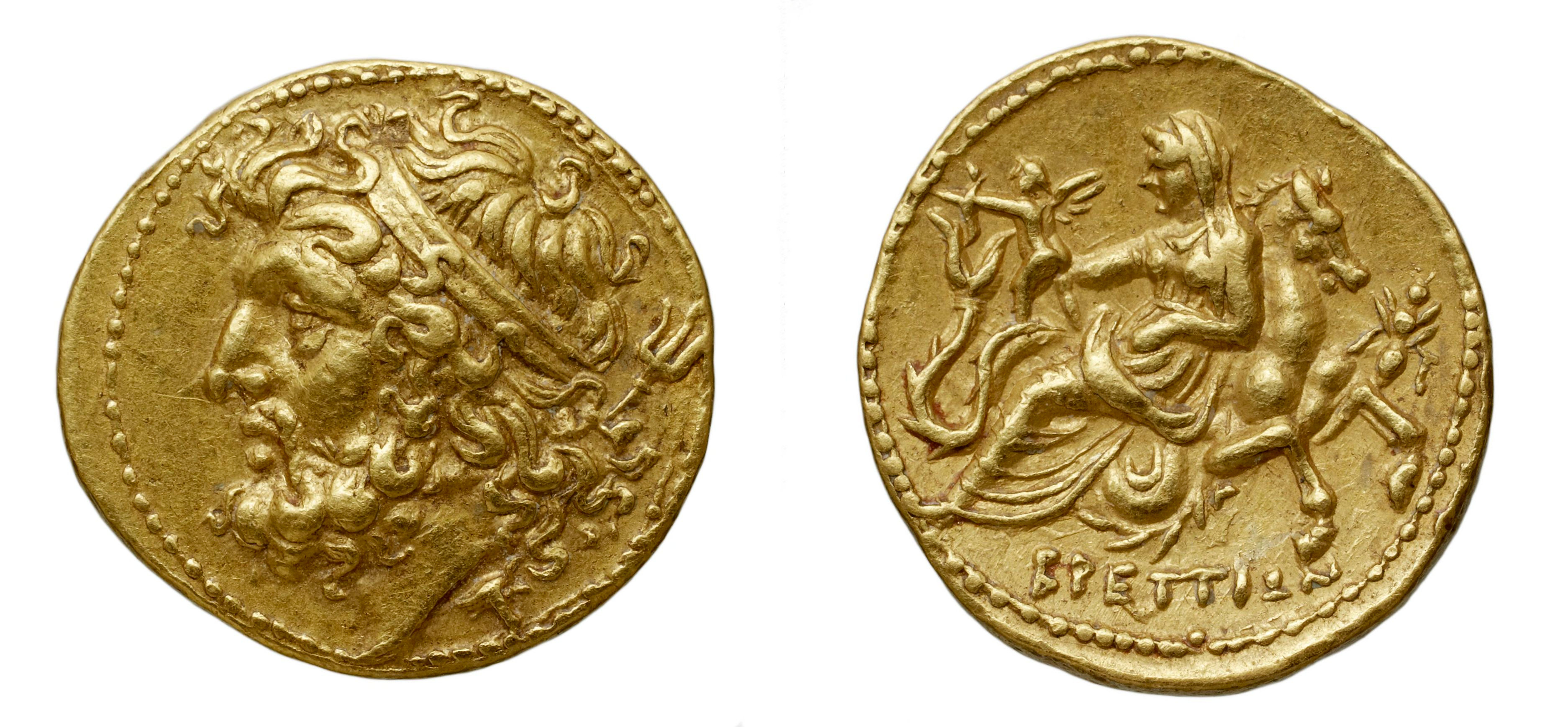 Drachme en or, Bruttium. 4,22 g.